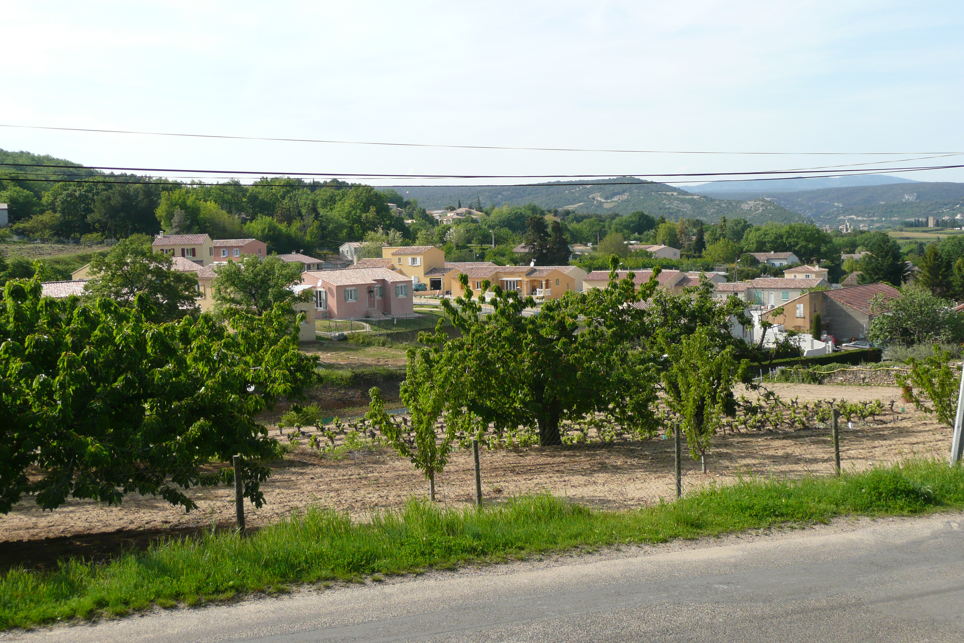 En premier plan Saint-Julien-de-Peyrolas et en arrière plan à droite Aiguèze.